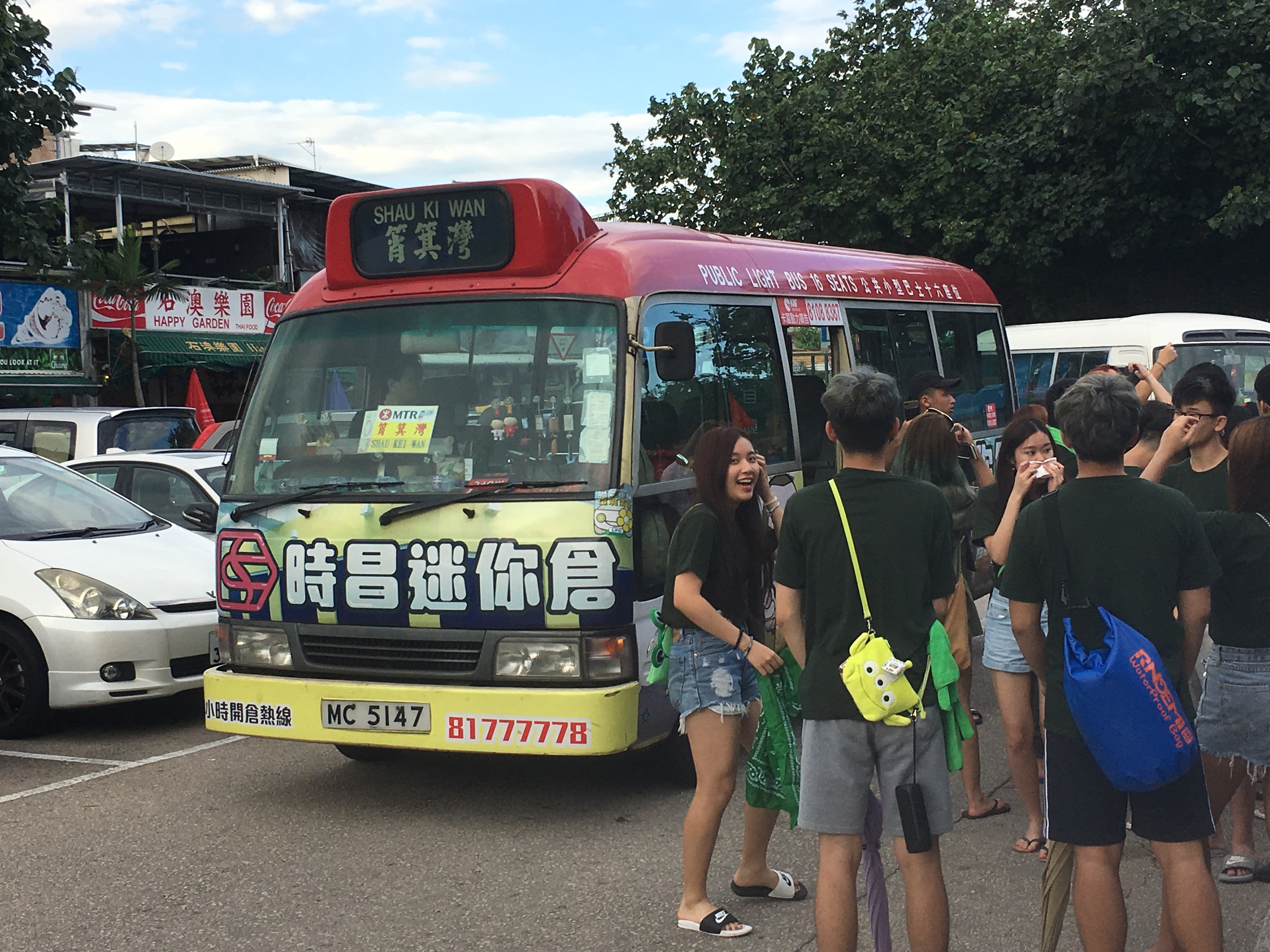 This photo is taken in Shek O.